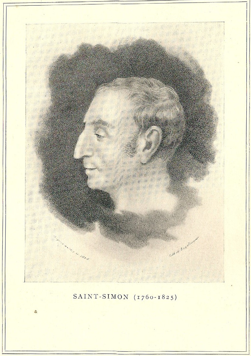 Portrait de Claude Henri de Rouvroy de Saint-Simon.